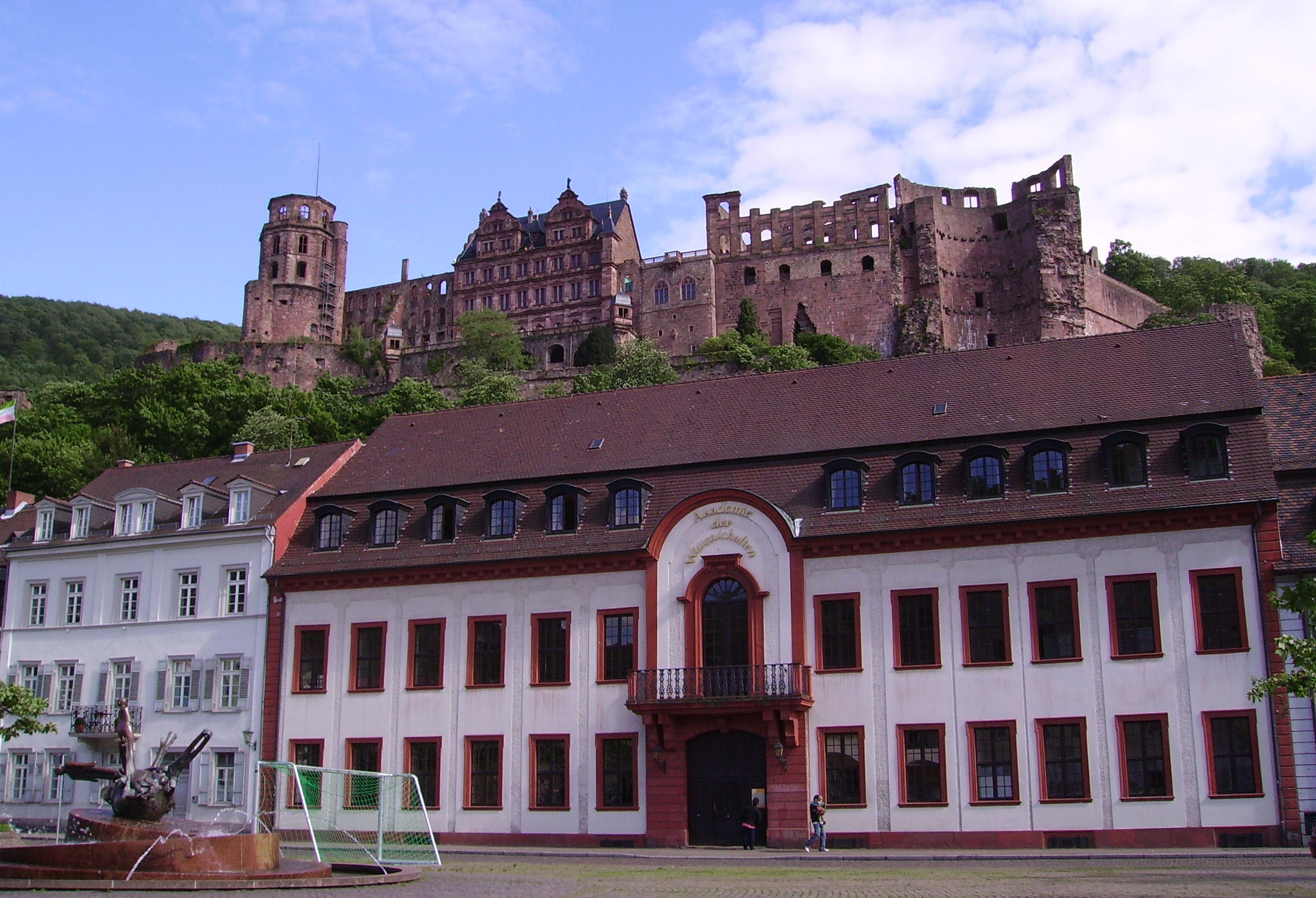 views of Heidelberg, Germany